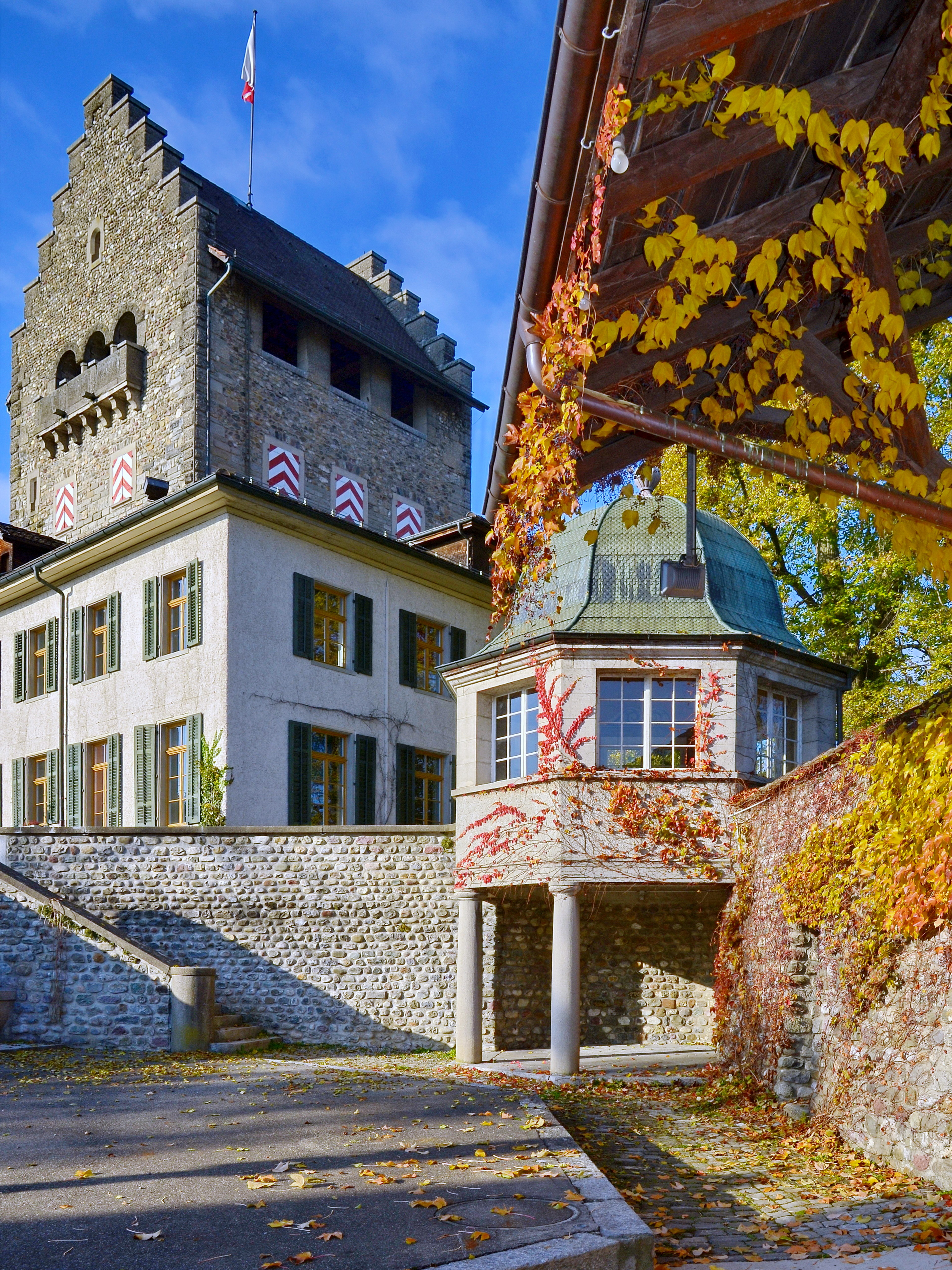 Schloss in Uster (Switzerland)